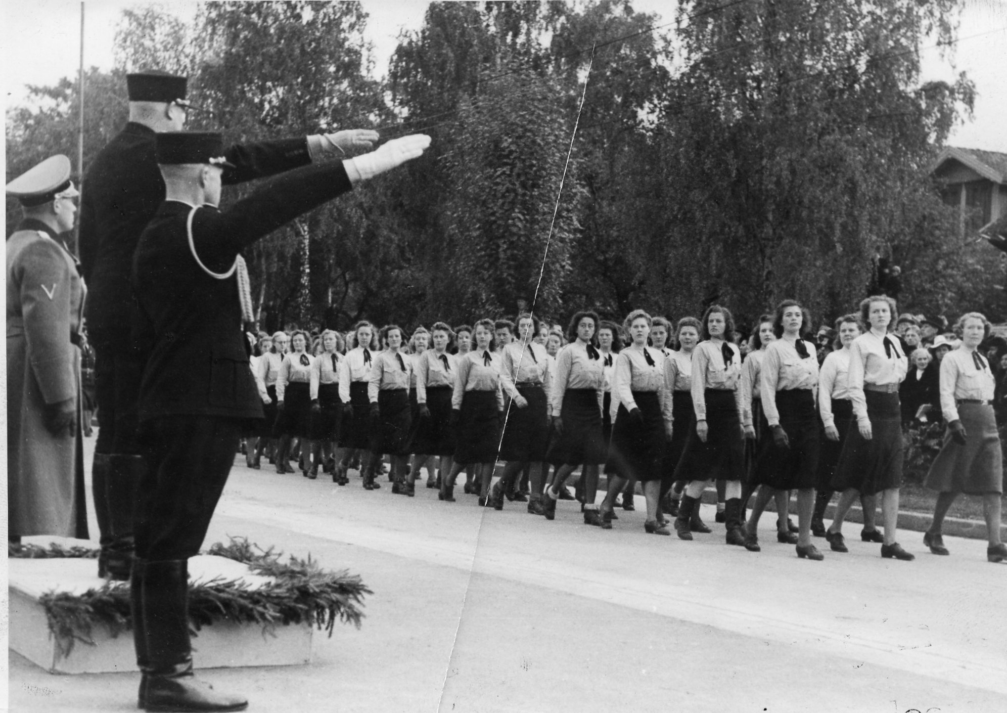 1942/09/27. RA/RAFA-3309/U 41B/10/41-10-5 img343